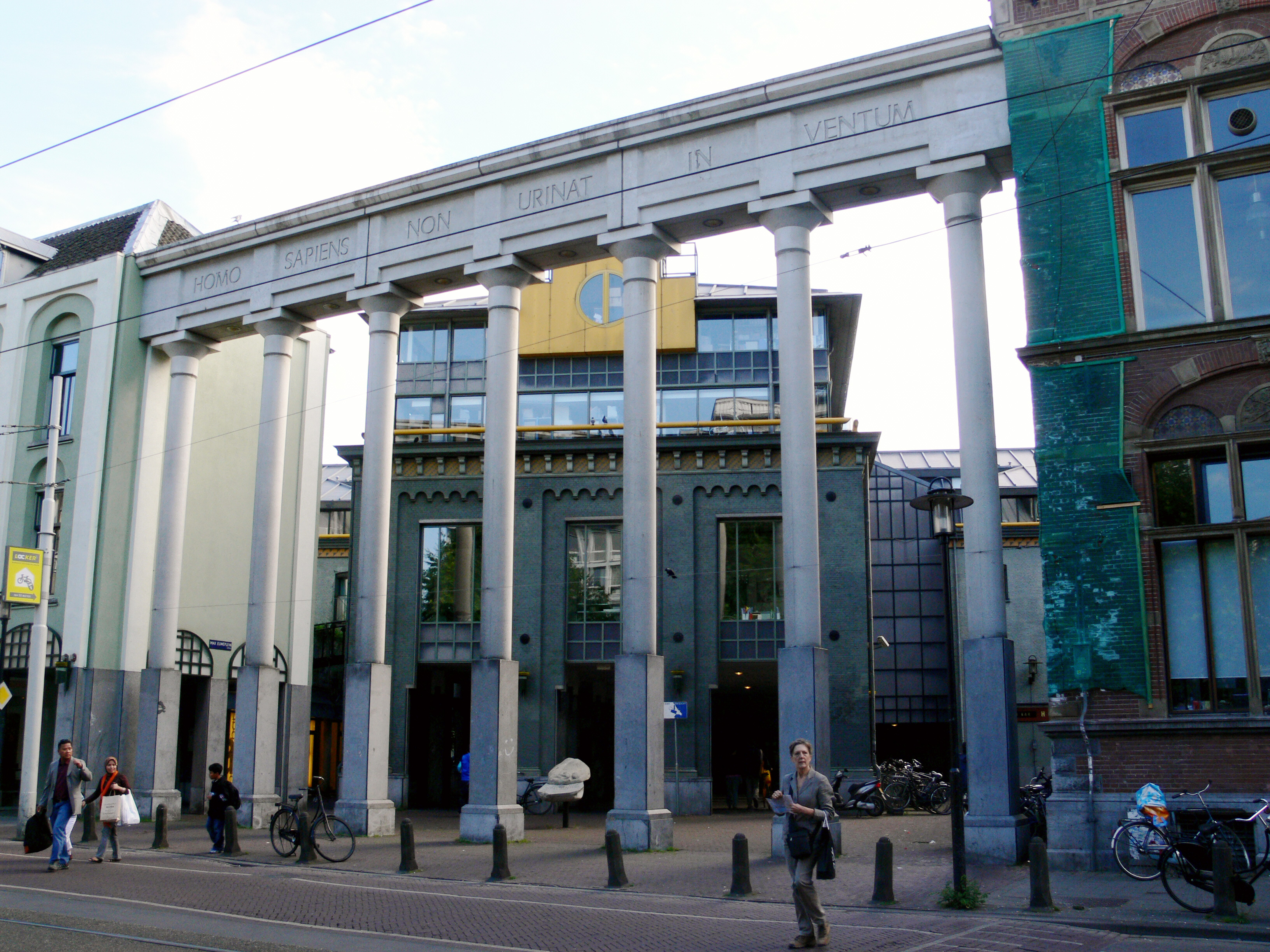 "Homo sapiens non urinat in ventum", entrance to a shopping centre, Kleine-Gartmanplantsoen / Max Euweplein, Amsterdam; met tussen de pilaren kunstwerk Gedenksteen voor het voormalig Huis van Bewaring.